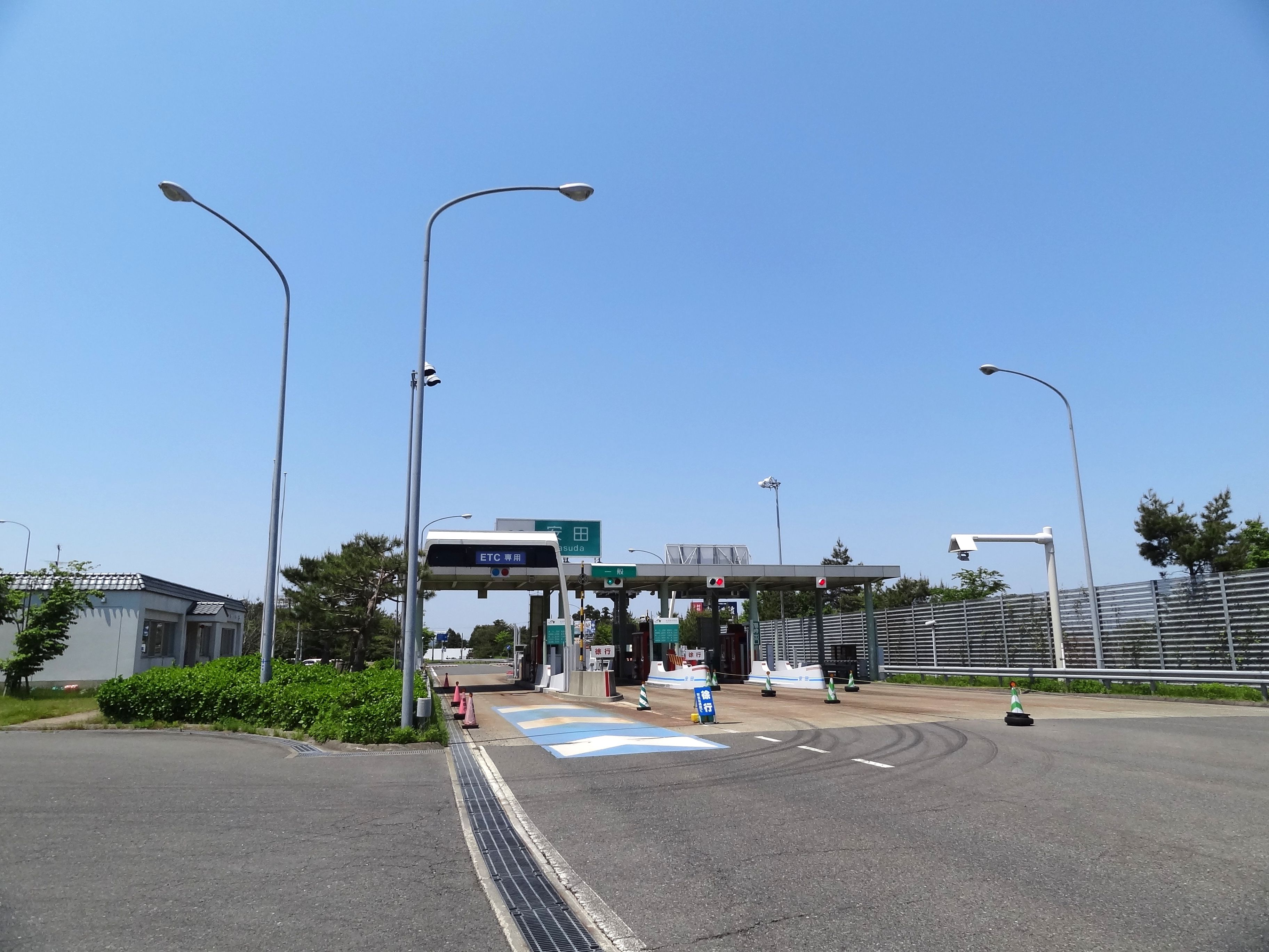 磐越自動車道 安田インターチェンジ（料金所付近）